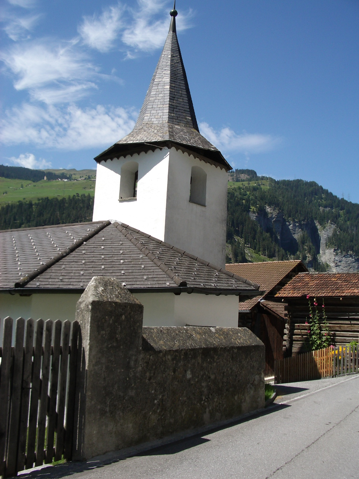 Reischen GR, Switzerland